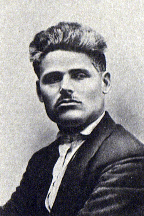 Сапронов, Тимофей Владимирович